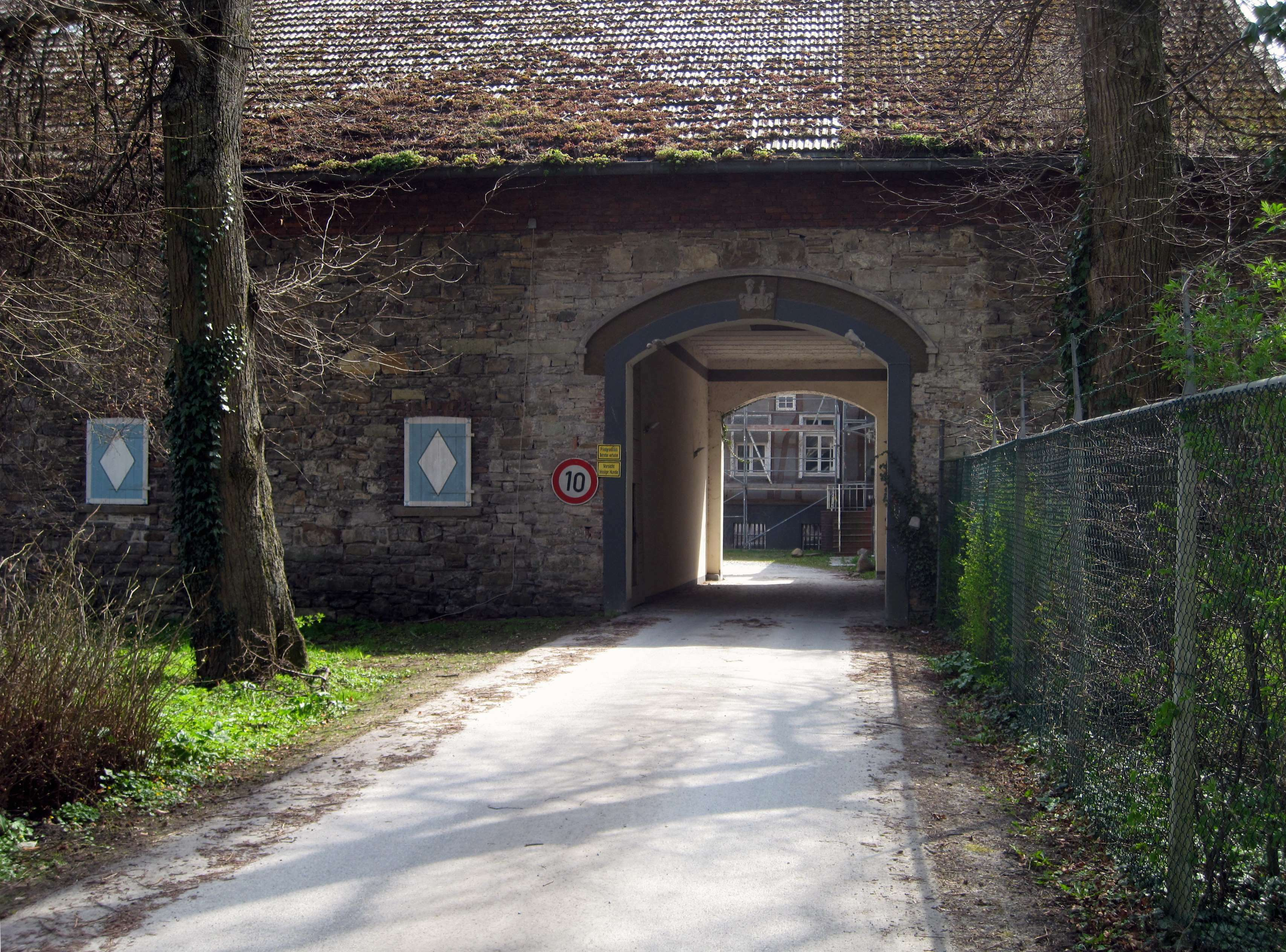 Gut Rödinghausen, Hönnetalstraße in Menden (Sauerland). This image shows a heritage building in Germany, located in the North Rhine-Westphalian city Menden (Sauerland) (no. 26).